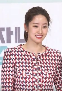 환상케미~💕